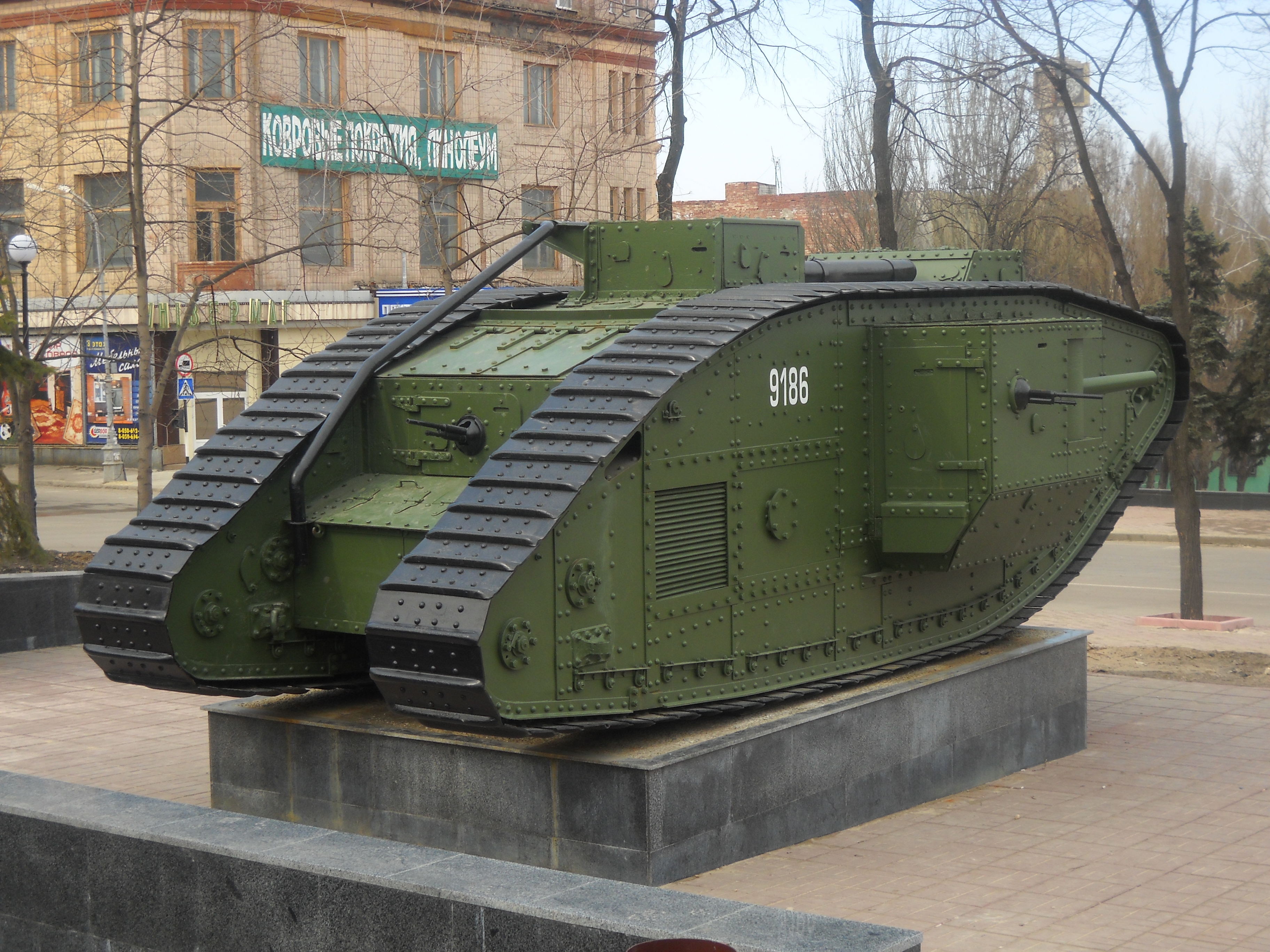 Танк MkV в Луганске после реставрации